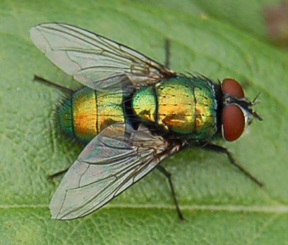 Mouche verte de dos - Green fly